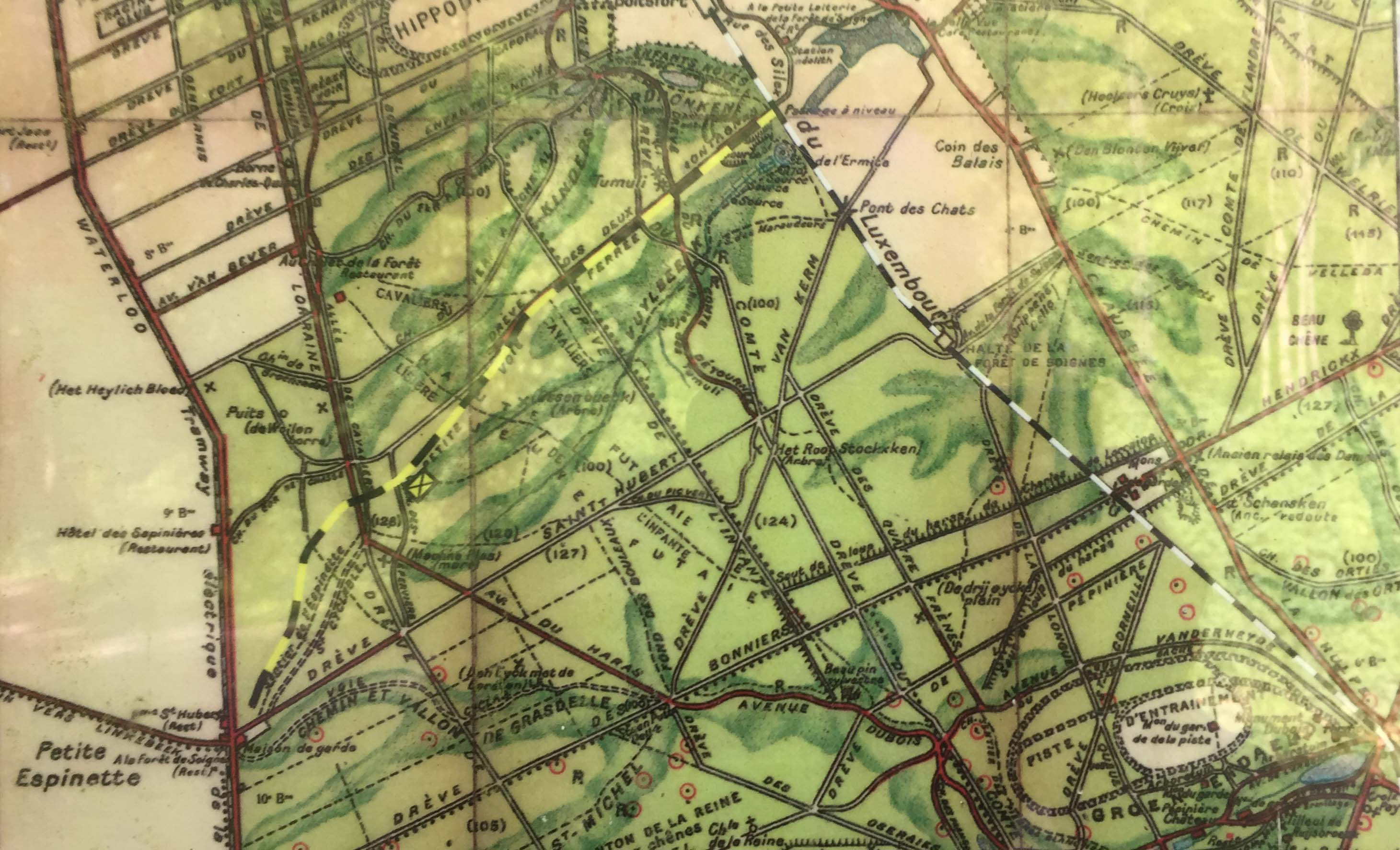 Itinéraire du chemin de fer de la forêt de Soignes